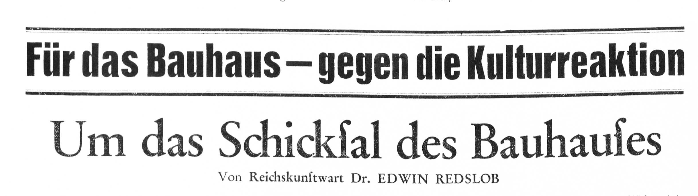 Edwin Redslob Bauhaus Berliner Tageblatt 1932